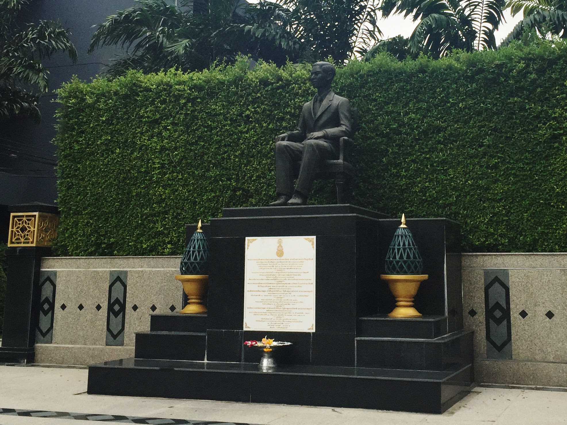 ลานพระบรมราชานุสาวรีย์ รัชกาลที่ 8 ภายในคณะแพทยศาสตร์ จุฬาฯ